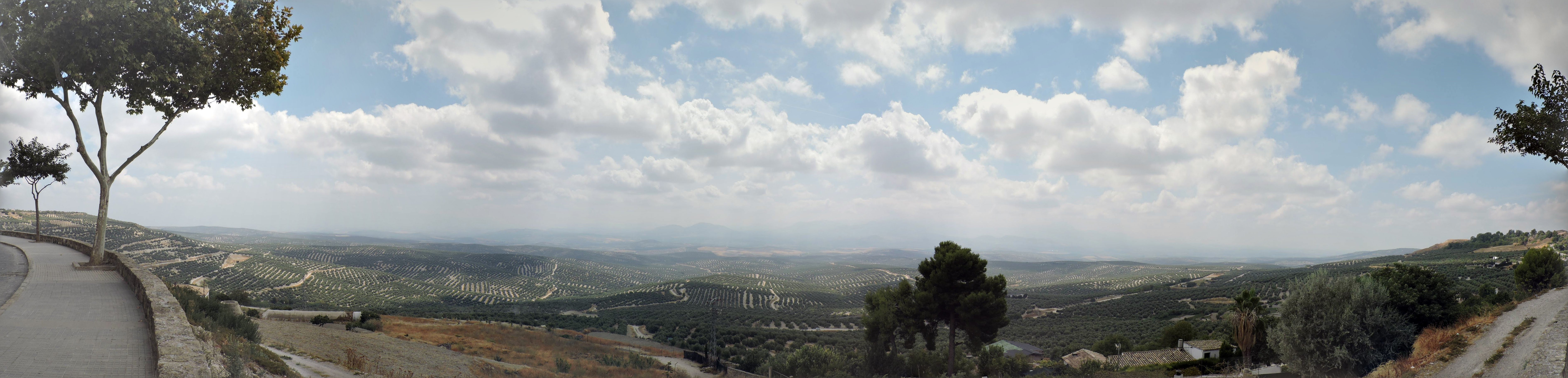 Vista de olivares desde el Paseo Redonda de Miradores